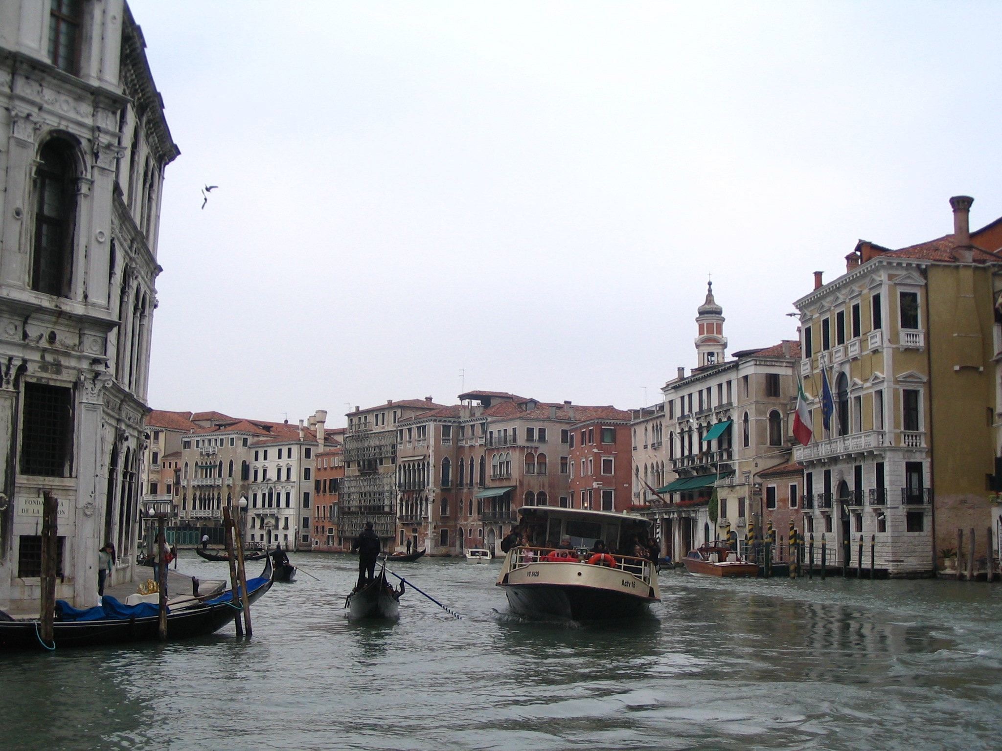 Palais Michel del Brusa - Palais Civran - Grand Canal Venise